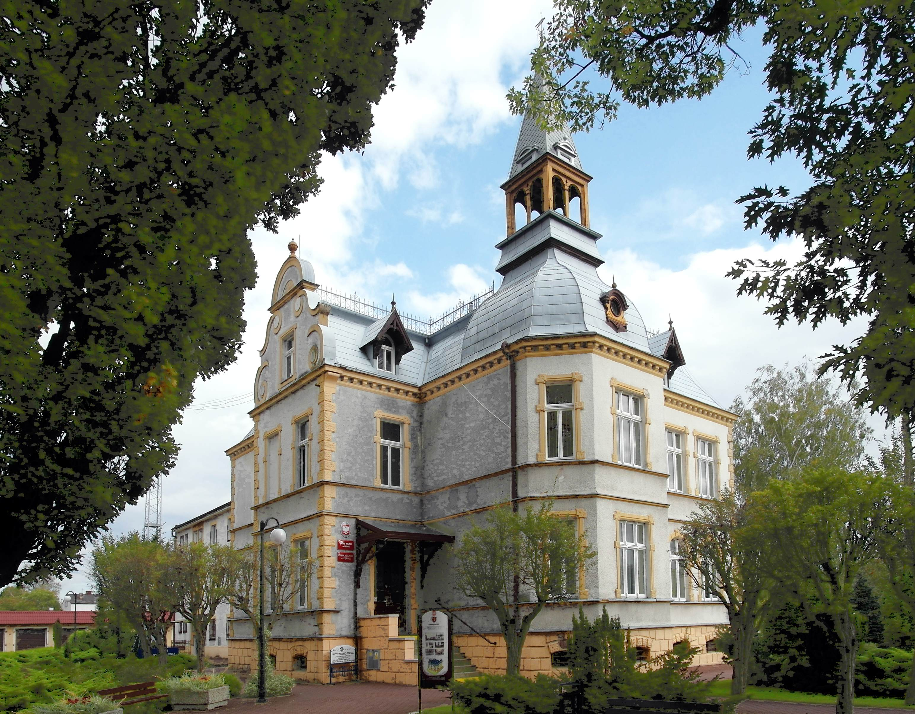 Dębno, willa, obecnie ratusz, ul. Józefa Piłsudskiego 5}